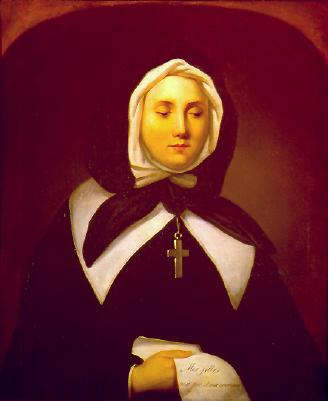 "Mes filles, ma joie et ma couronne"